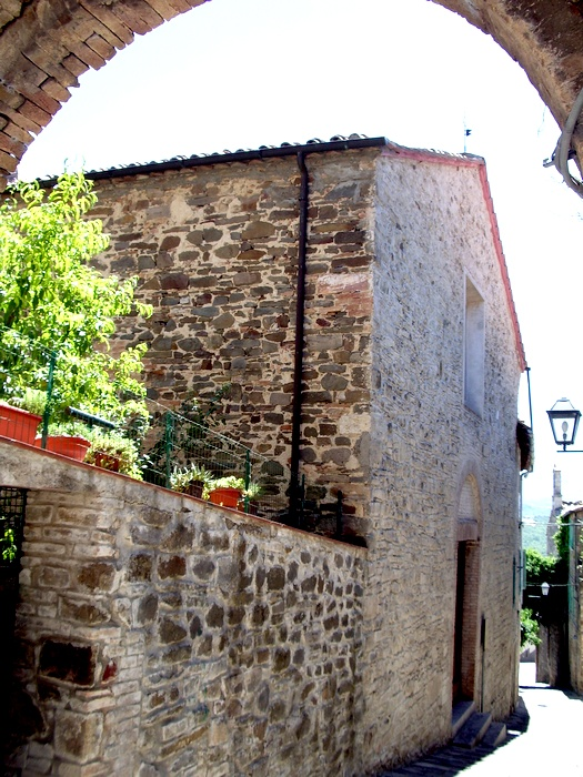 Pieve di Santa Lucia a Montenero d'Orcia (GR), Tuscany (Italy)